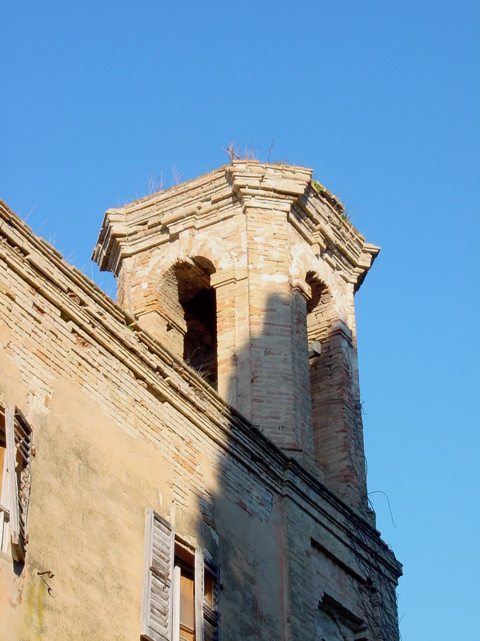 Particolare del campanile della Cappella incorporata nella Villa Valcerasa